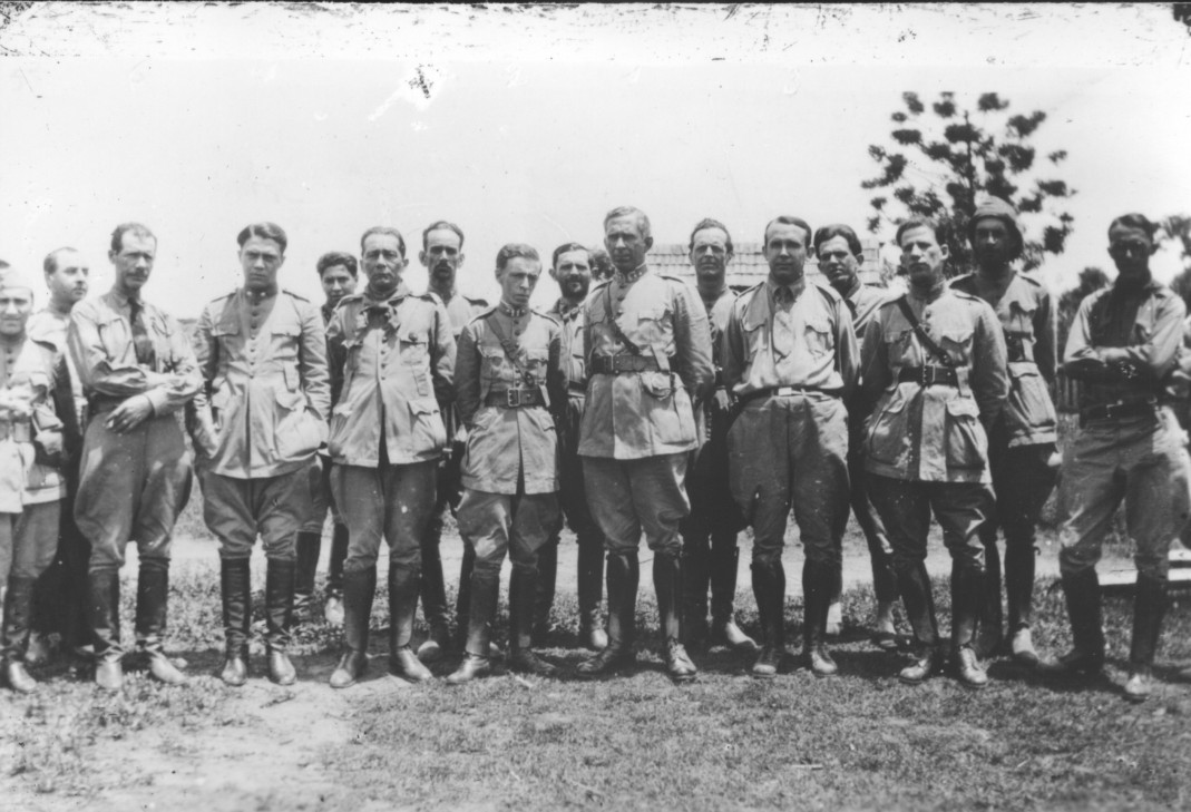 Cena da Revolução de 1930 (ao centro o mais alto é Miguel Costa) fotografada por Claro Jansson.